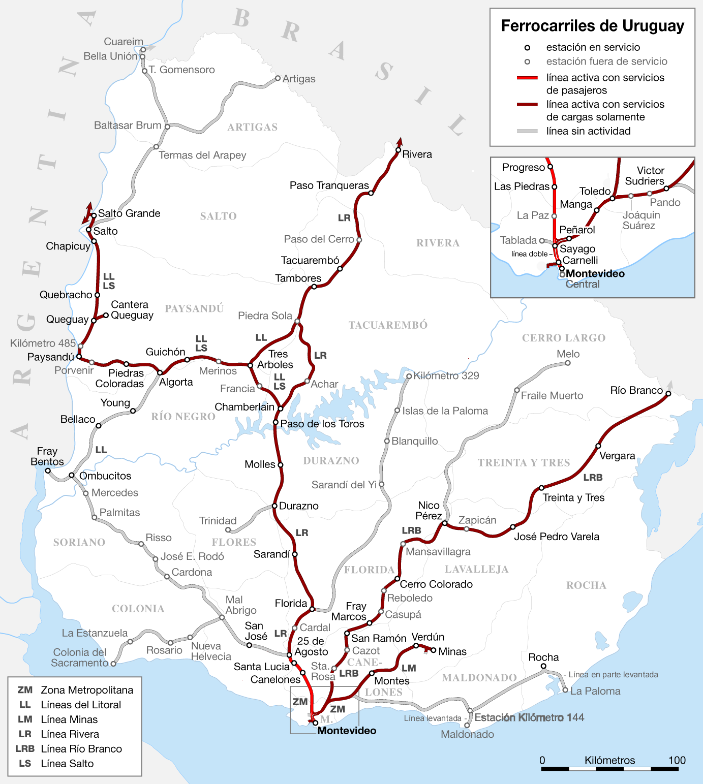 Mapa red ferroviaria uruguaya enero 2016